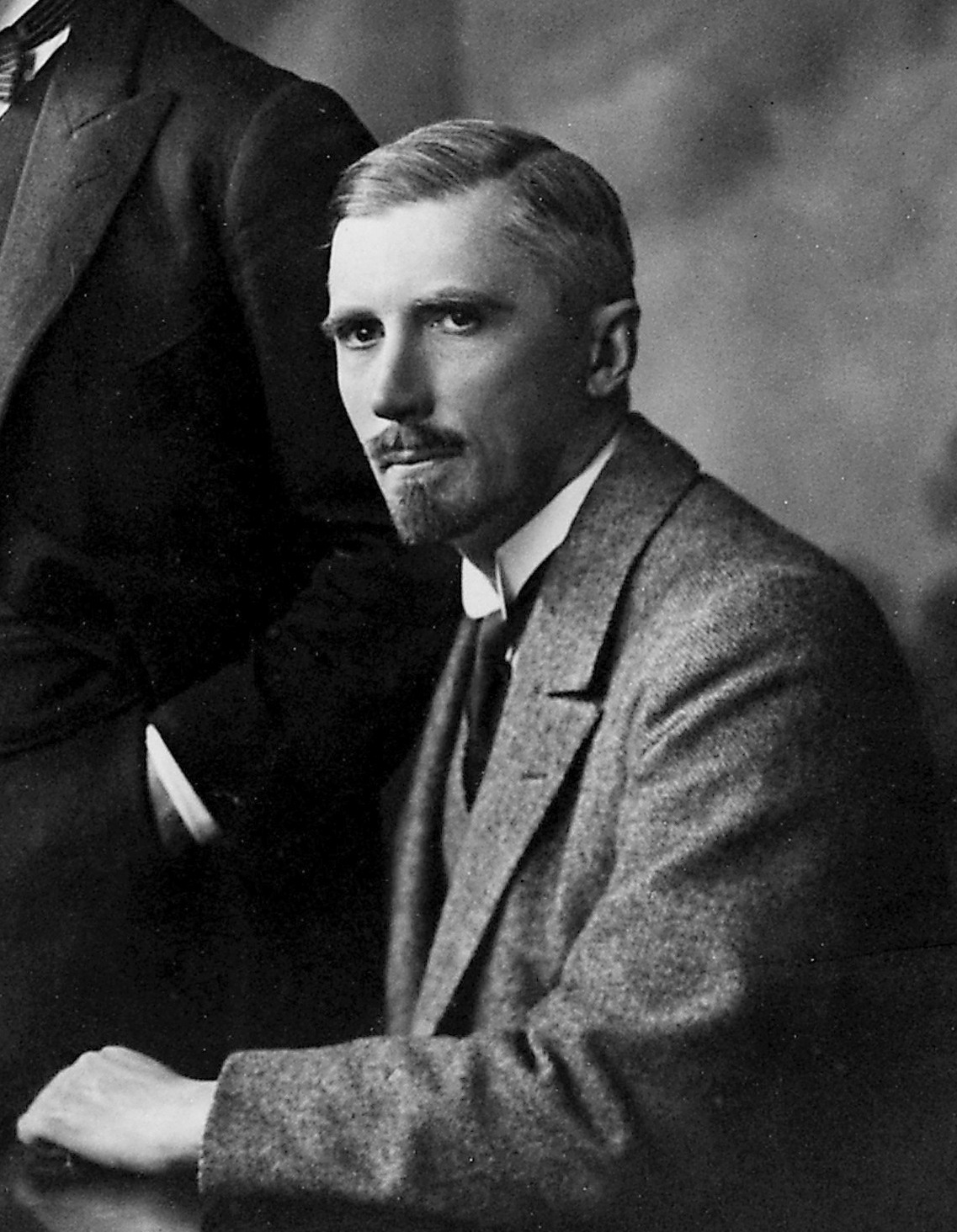 B.P. Babkin.